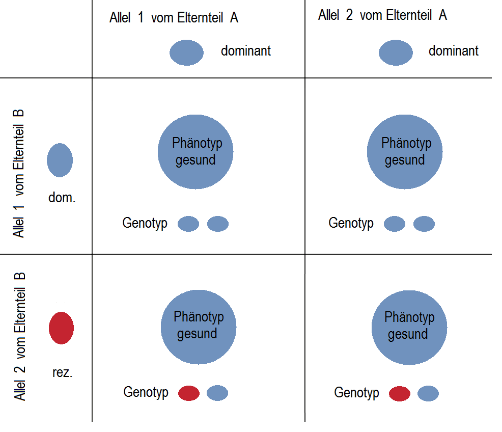 Konduktoren